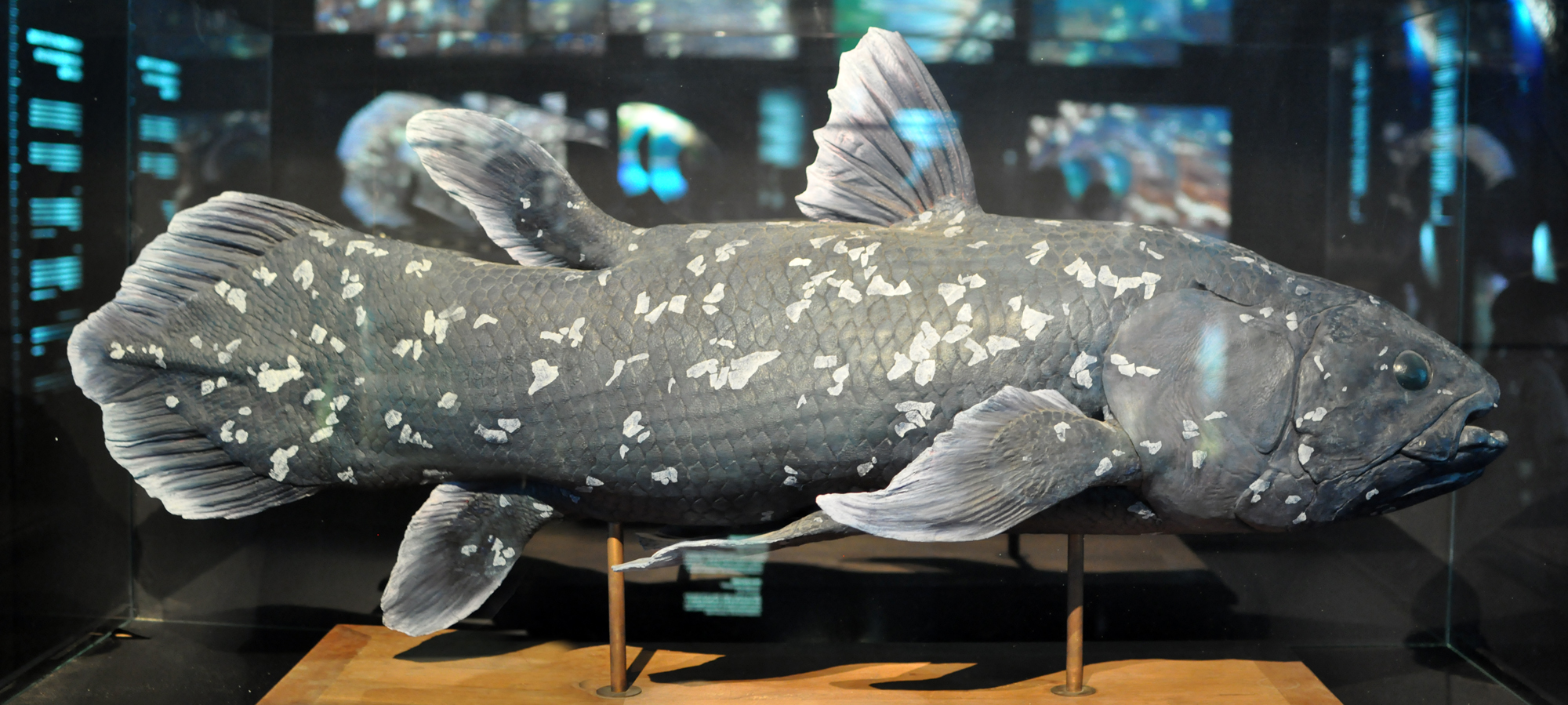 Latimeria chalumnae replica